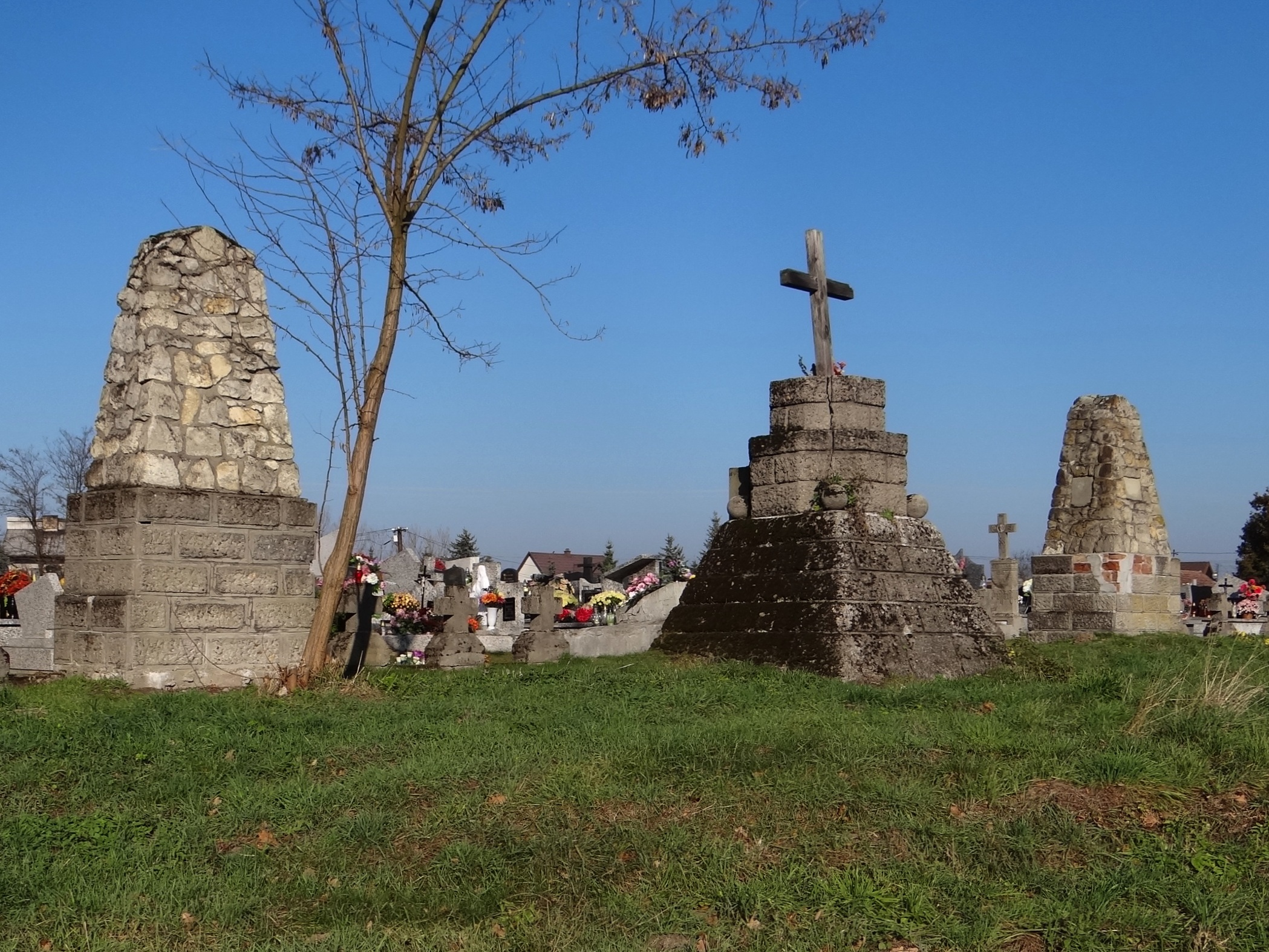 Cmentarz wojenny nr 266 - Borzęcin